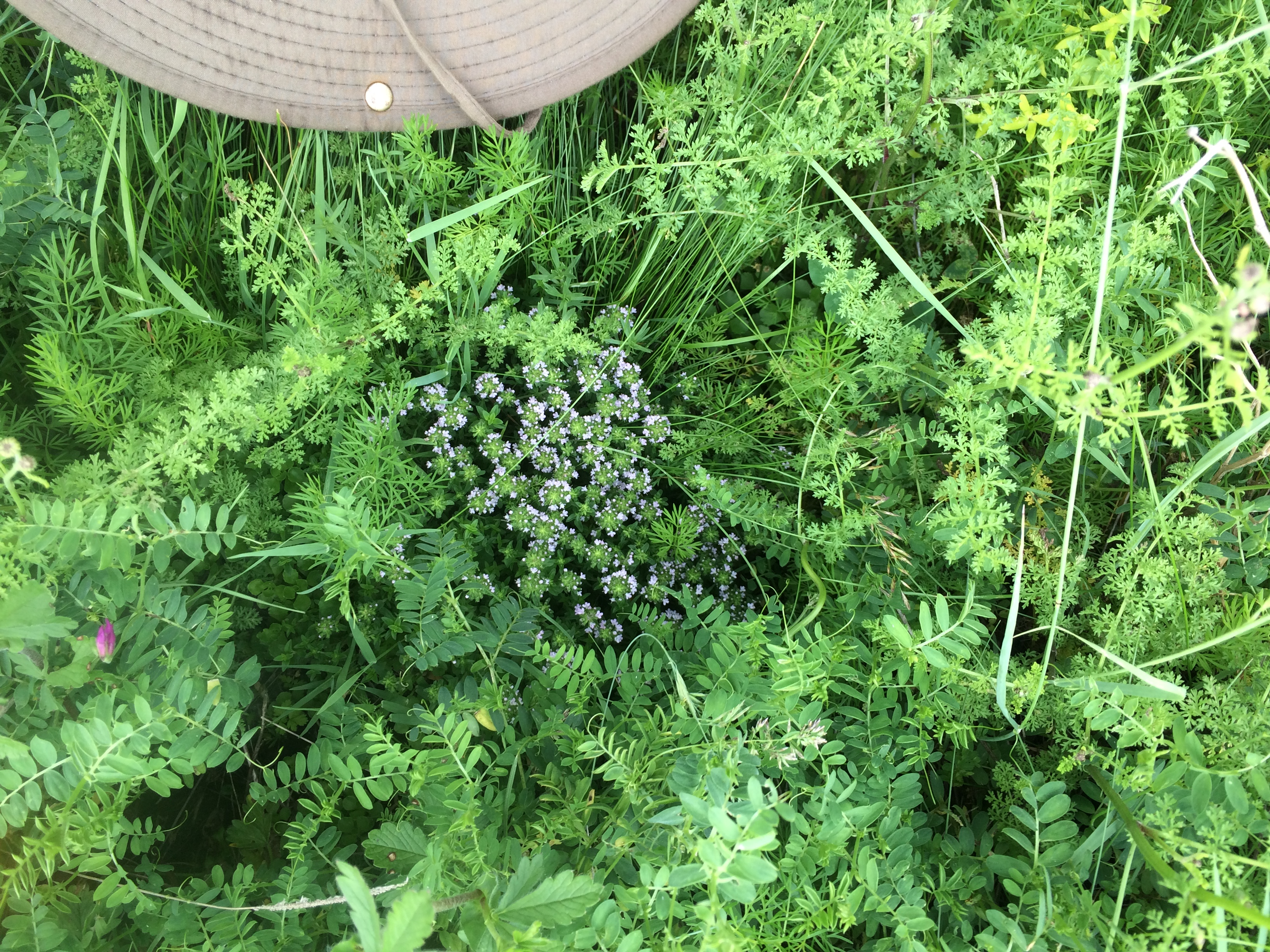 Цветущий тимьян среди густой травы. Кулинский район Дагестана.